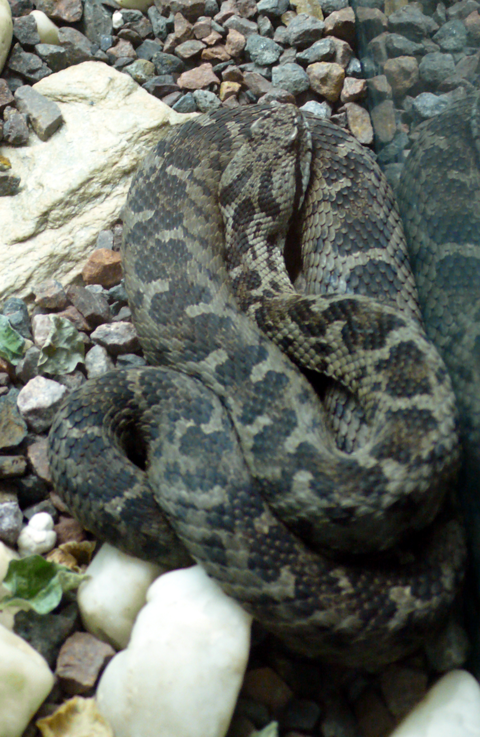 Bolkar Viper (Montivipera bulgardaghica)